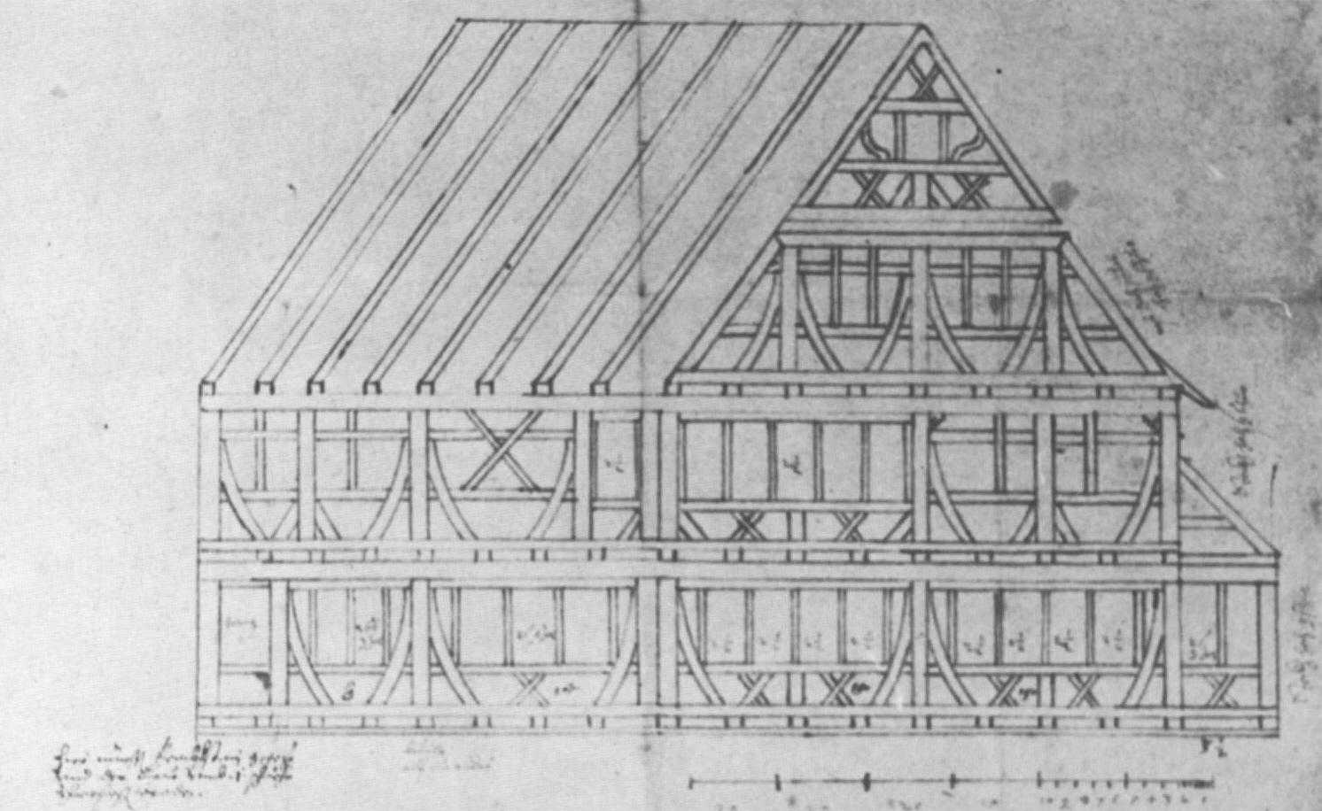 Bauplan der deutschen Schule in Herrenberg, 1653–1654, Fachwerkaufriss. Grundriss siehe Image:Herrenberg Deutsche Schule 1653 b.jpg